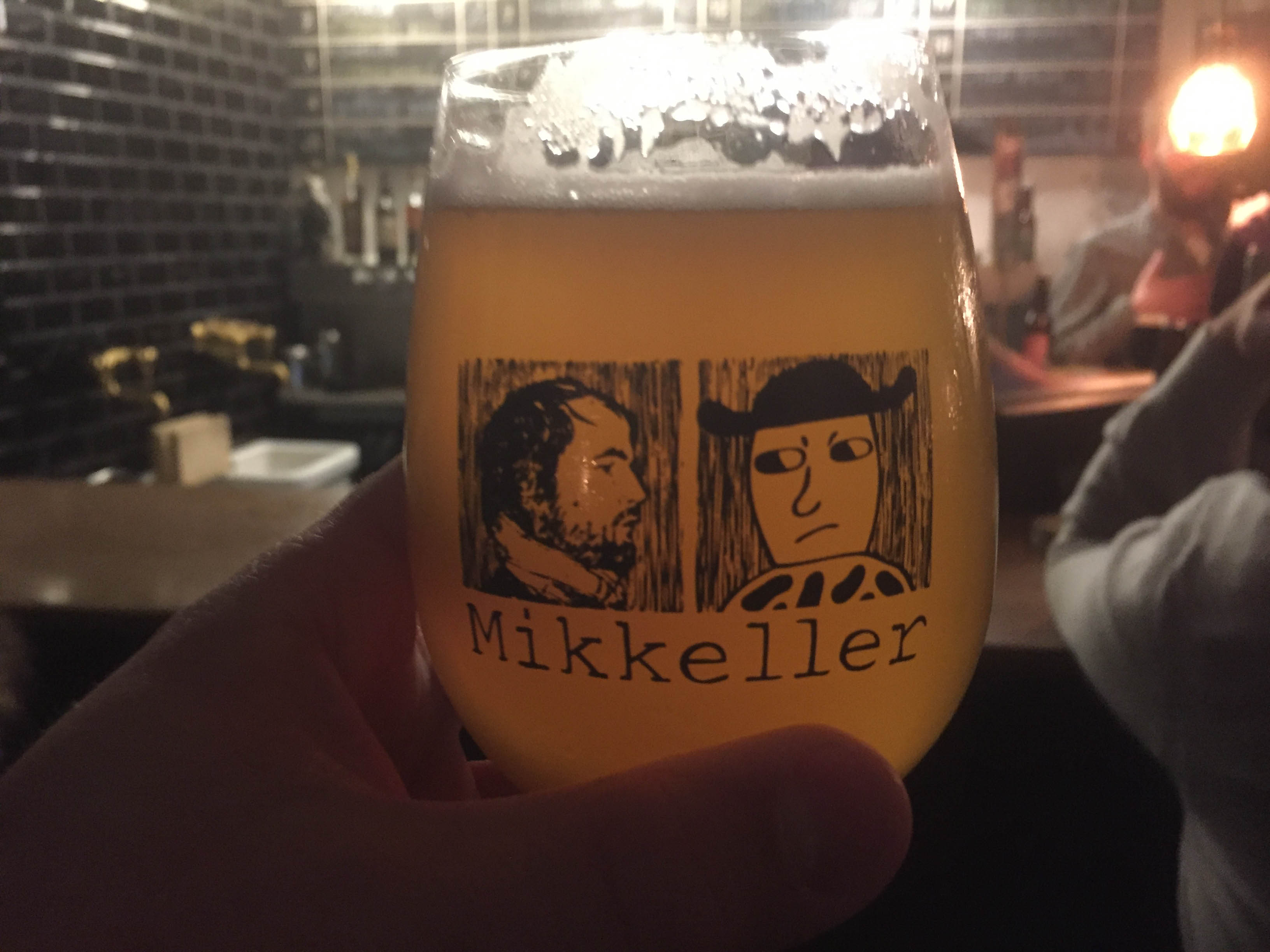 Mikkeller